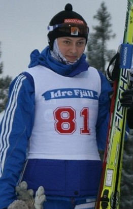 en: Olga Vilukhina